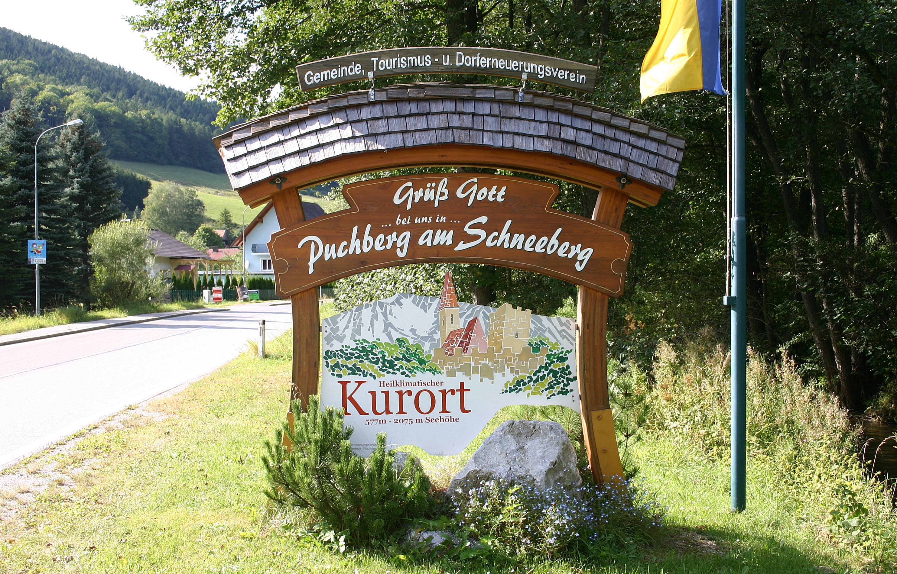 Puchberg am Schneeberg – Willkommenstafel am Ortseingang